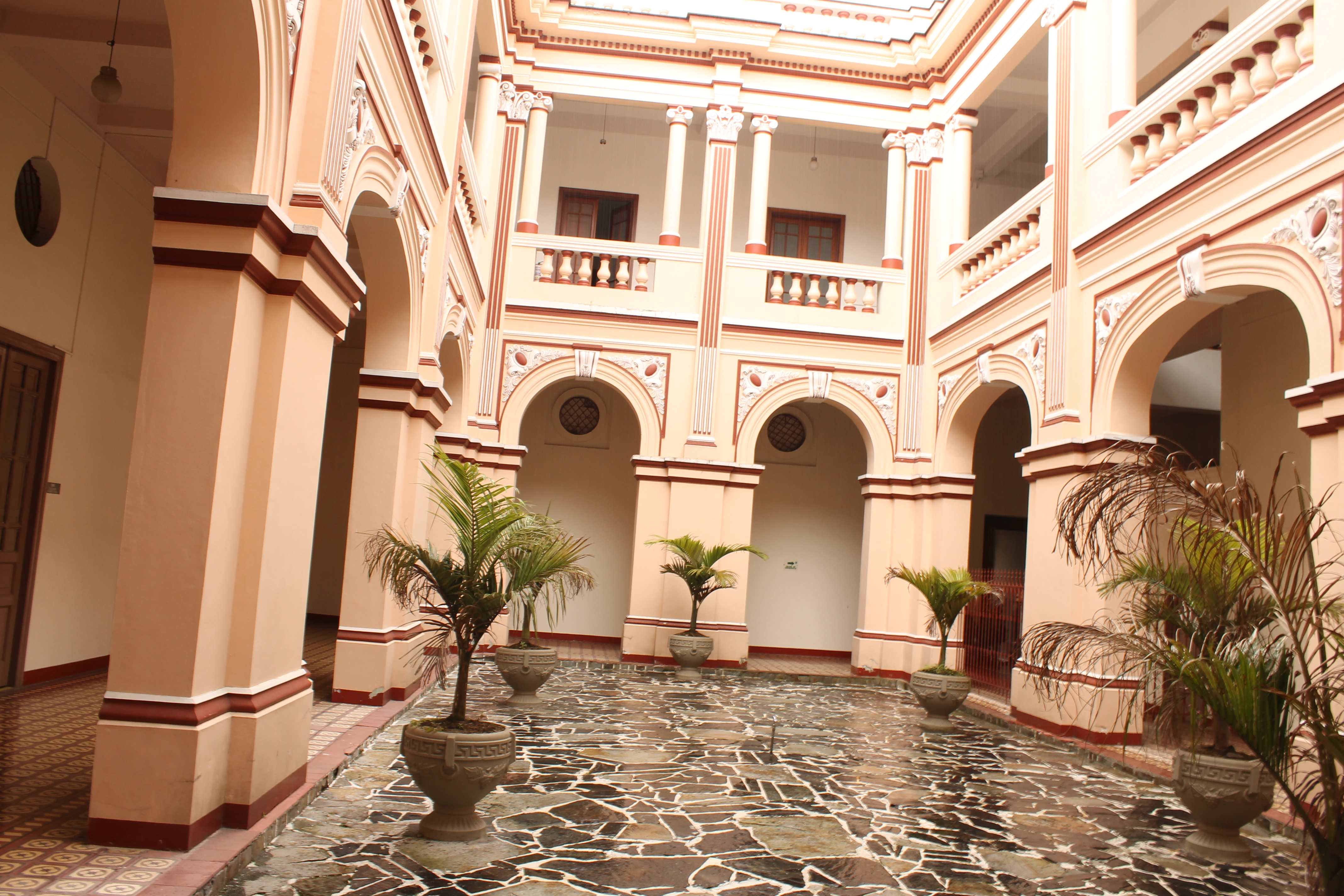 vista desde adentro de Arquidiócesis de Manizales